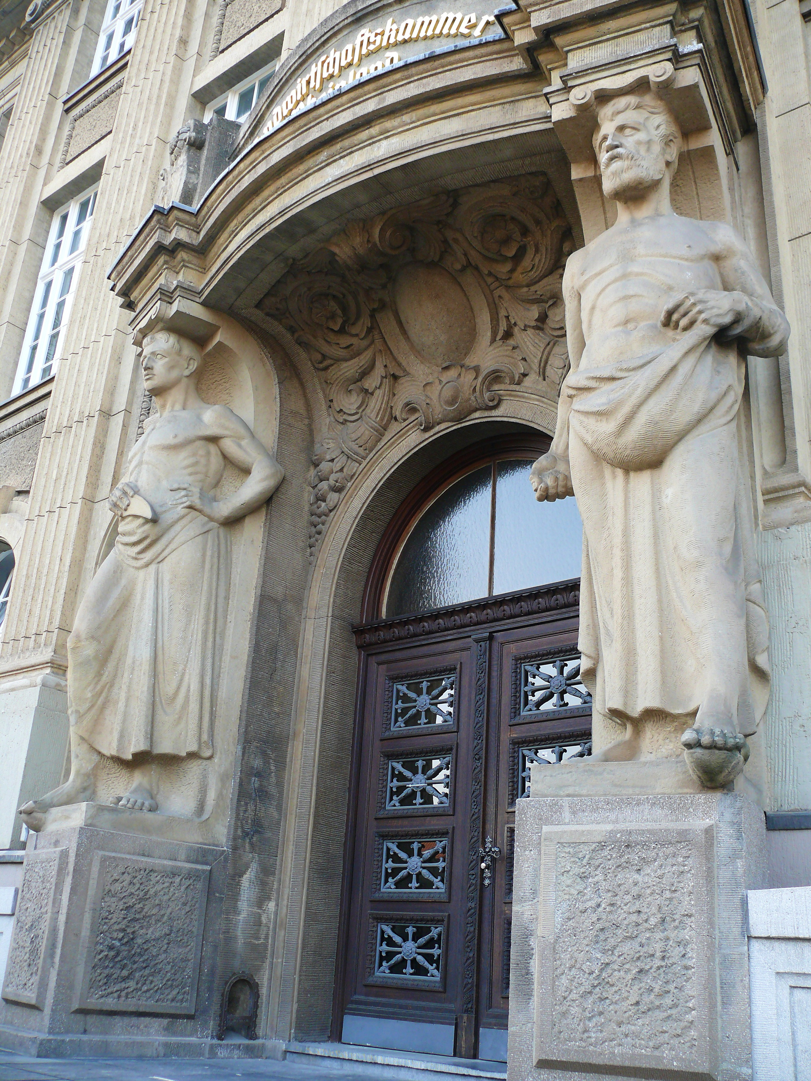 Landwirtschaftskammer Rheinland in Bonn: Eingang mit Skulpturen von Karl Menser